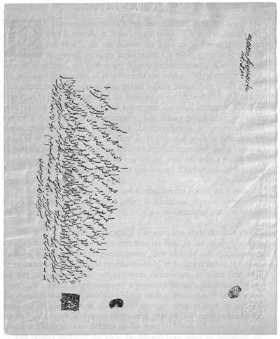 épitre de la main de Al-Bab à "Celui que Dieu rendra manifeste".